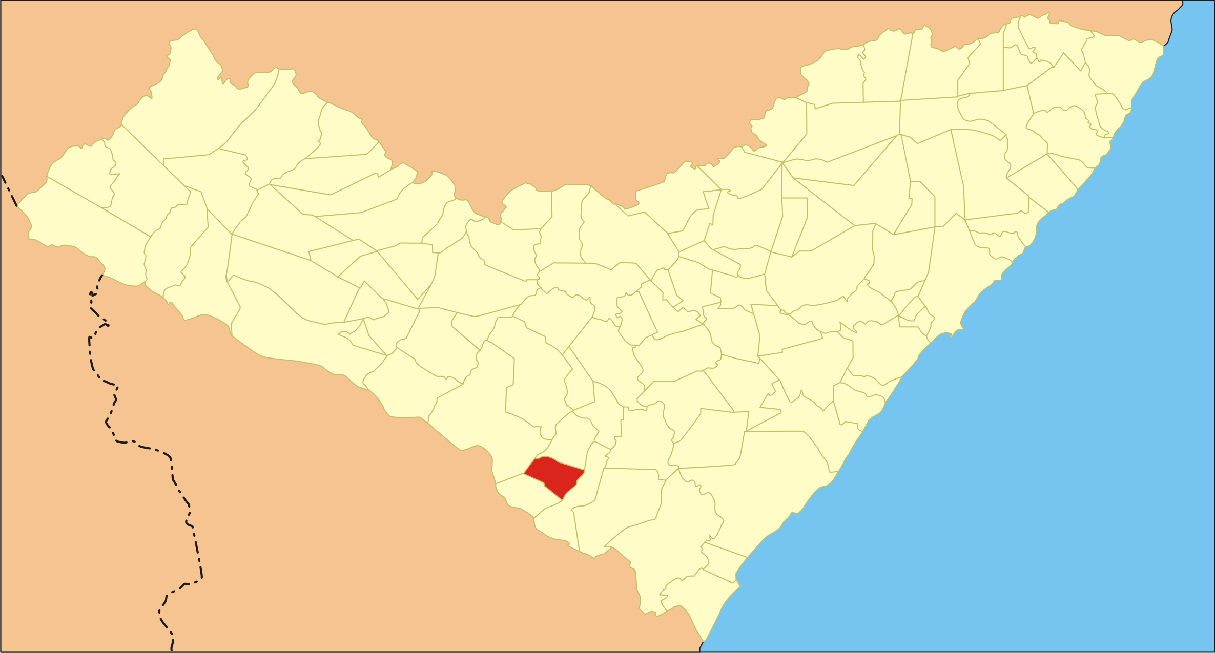 Localização da cidade no estado de Alagoas.